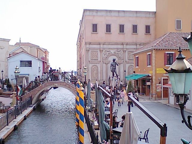 Même photo qu'il y a 5 minutes, mais après une petite retouche pour que ce soit moins sombre, désolé je débute. Pris le 25 mars 2007 par Moi. Dans mon infinie bonté, j'en cède les droits pleins et entiers à l'humanité.